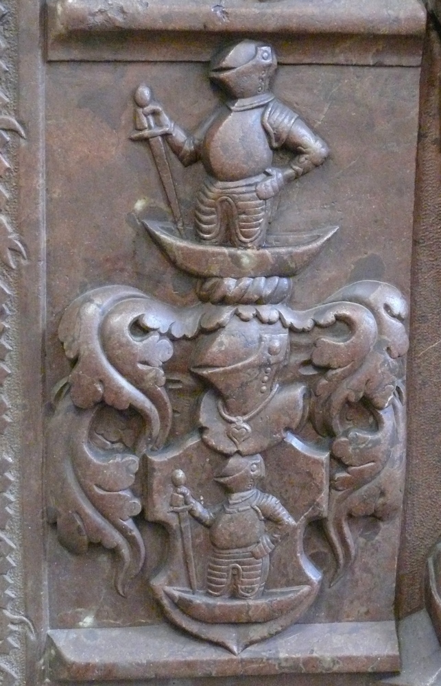 Erb Slepotických z Sulic na náhrobníku Heřmana Diviše Slepotického z Sulic, Starý Knín, kostel sv. Františka, okres Příbram